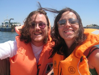 Geoff Lloyd